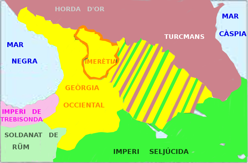 Any 1259, primera partició del Regne de Geòrgia en dues regions: la part occidental i la part oriental exposada a vassallatge, amb l'aparició del regne d'Imerètia.